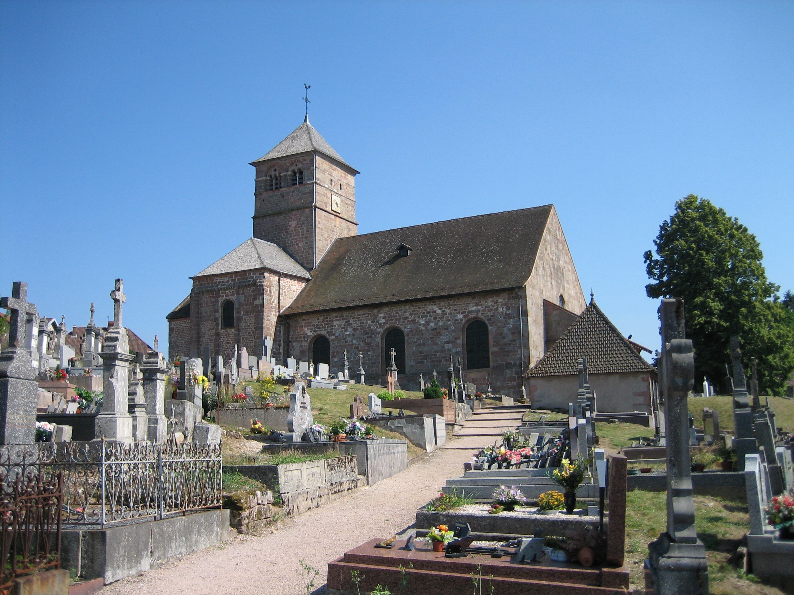 Vue de l'église Notre-Dame de Champ-le-Duc entourée de son cimetière Vue prise par Raphaël Tassin (raphdvoj) le 15/07/2006 .